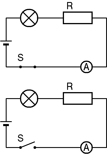 Offener und geschlossener Stromkreis, selbst erstellt